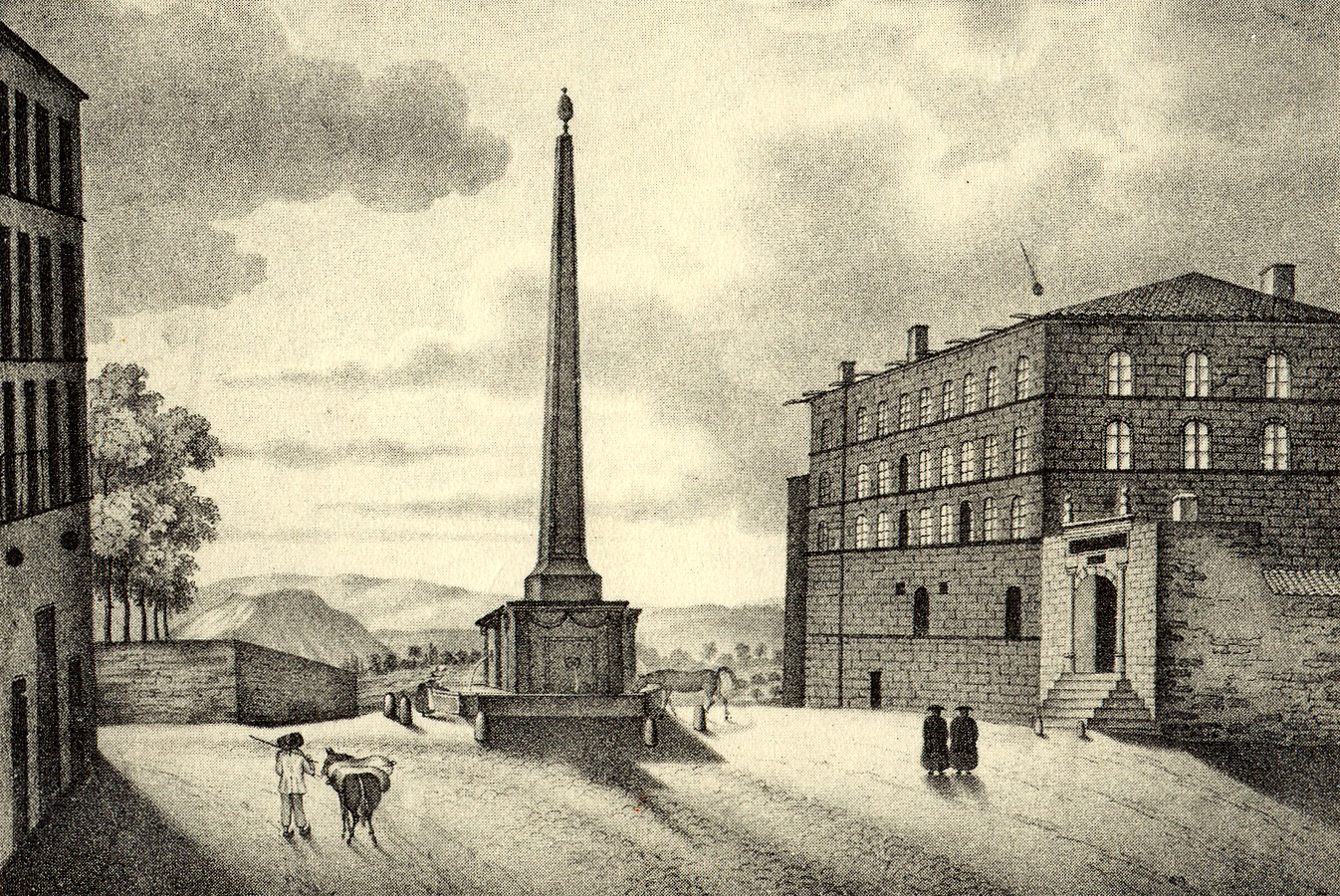 Gravure de la fontaine de la pyramide dédiée à Desaix - Clermont-Ferrand